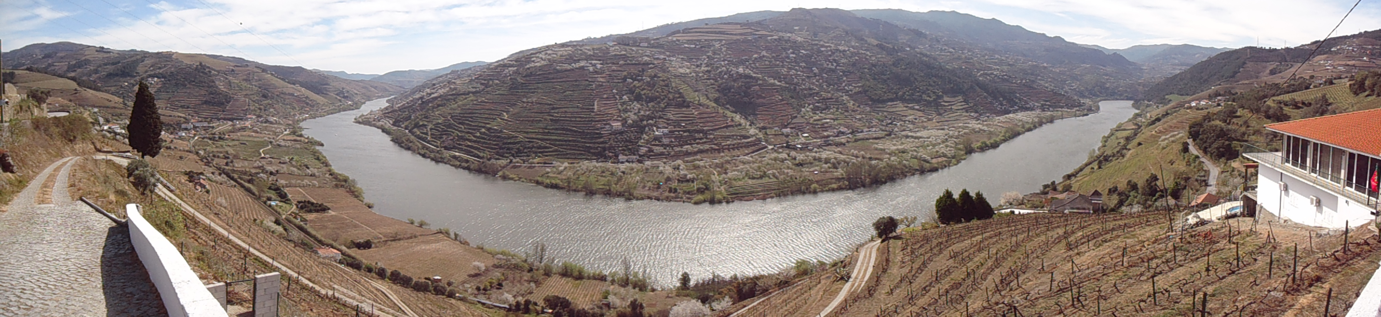 Alto Douro Vinhateiro: vista panorâmica do rio e das encostas cobertas de vinhas e oliveiras.